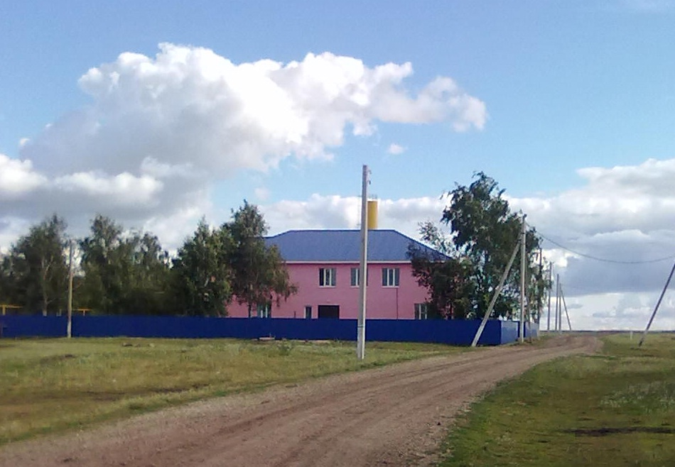 Правление колхоза